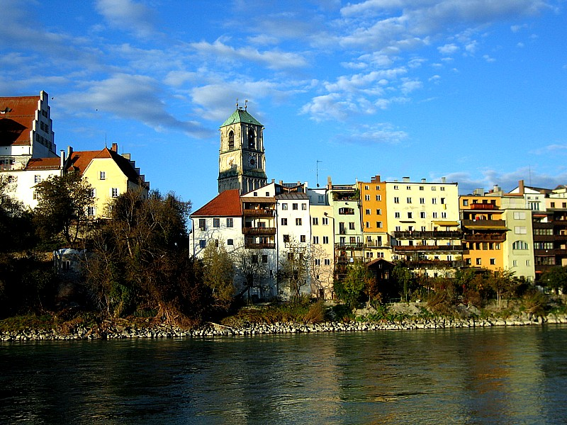 Wasserburg am Inn - Bayern - Deutschland